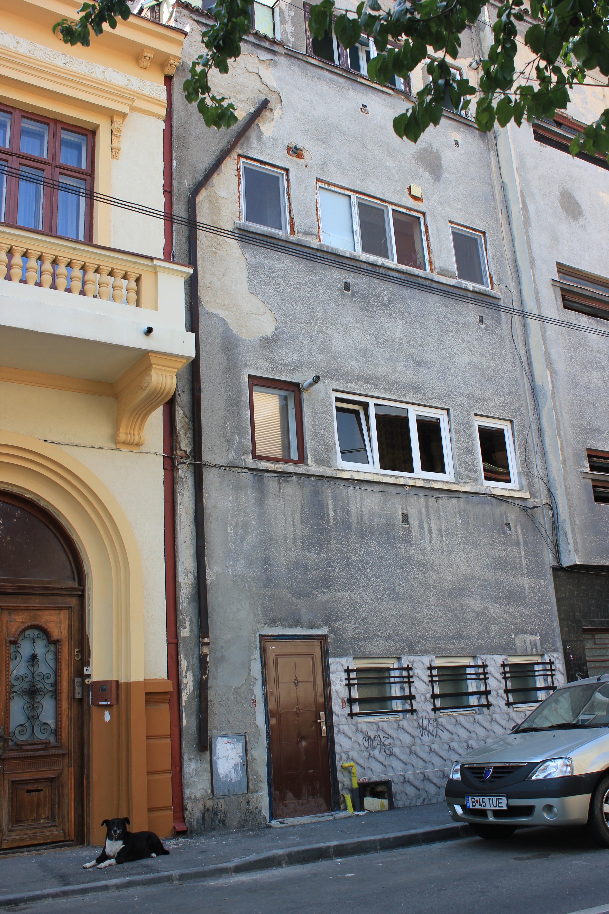 Casă de targovet